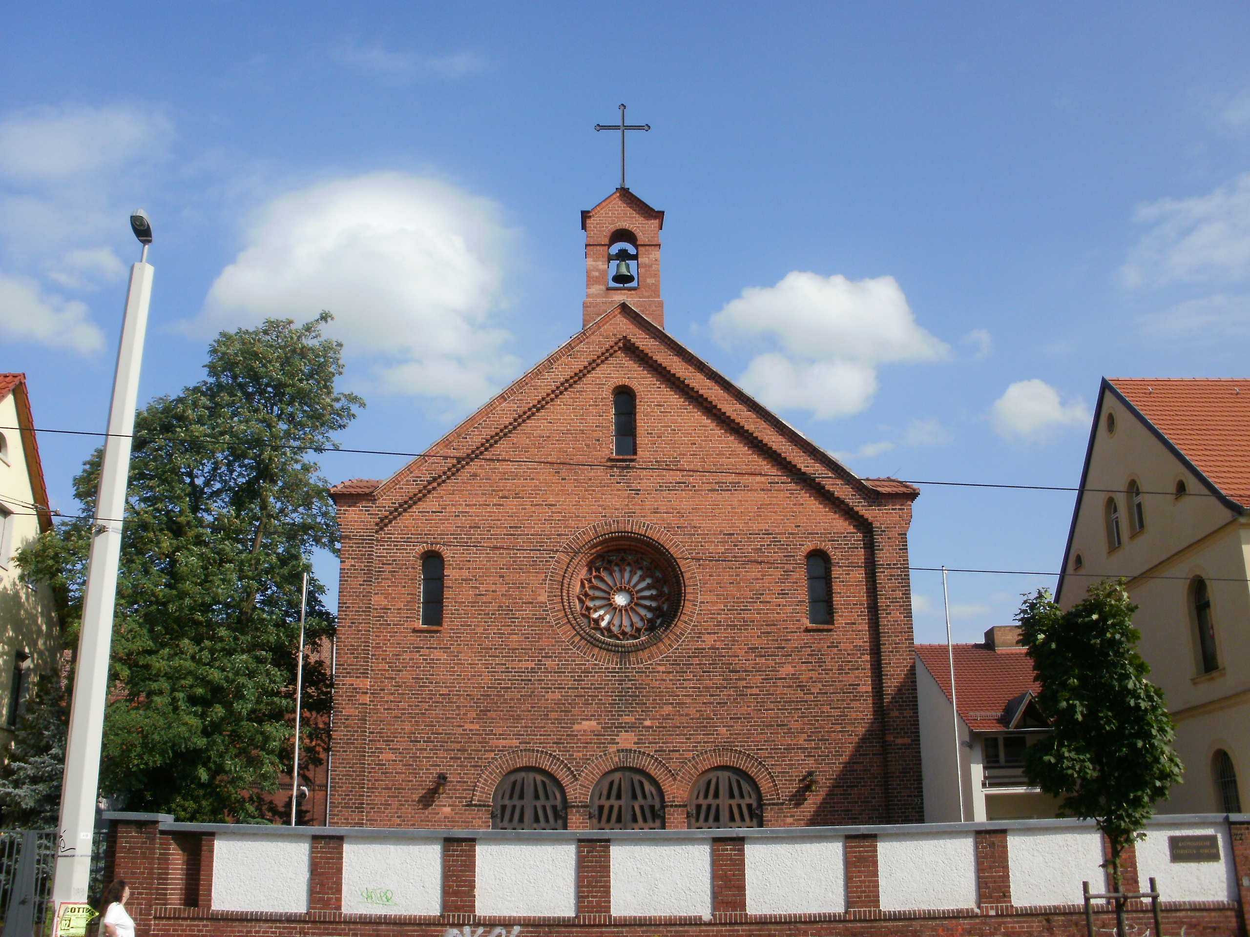 Christuskirche Straße der Jugend: Rückansicht